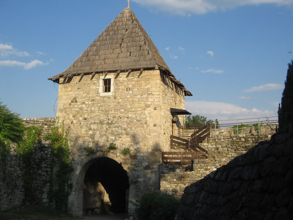 Tvrdjava Kastel (Banja Luka)